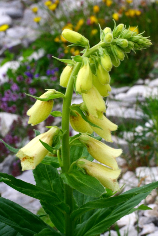 Digitalis_grandiflora (Digitale gialla grande) Località:"Giardino Botanico delle Alpi Orientali", Monte Faverghera (BL), 1500 m s.l.m.